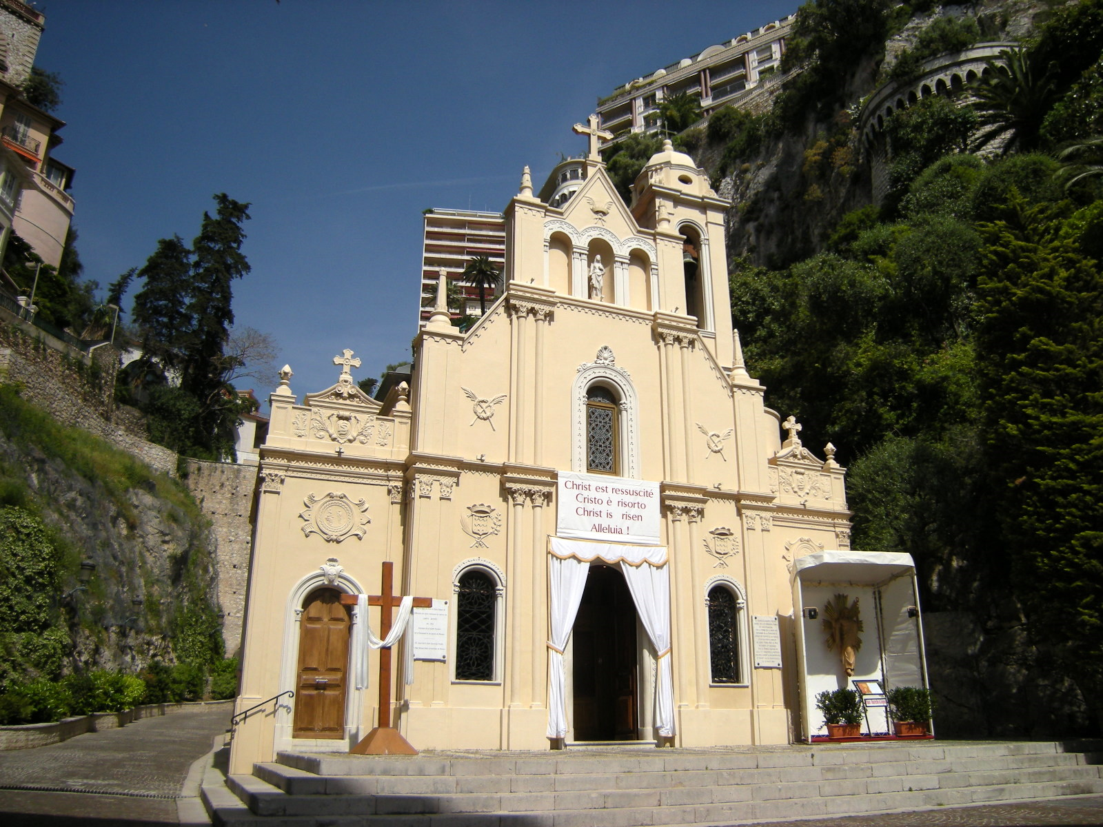 Principado de Mônaco